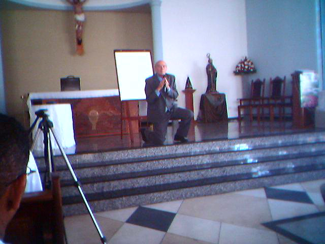 Se ajoelha Implorando para que o "demônio" o ataque.